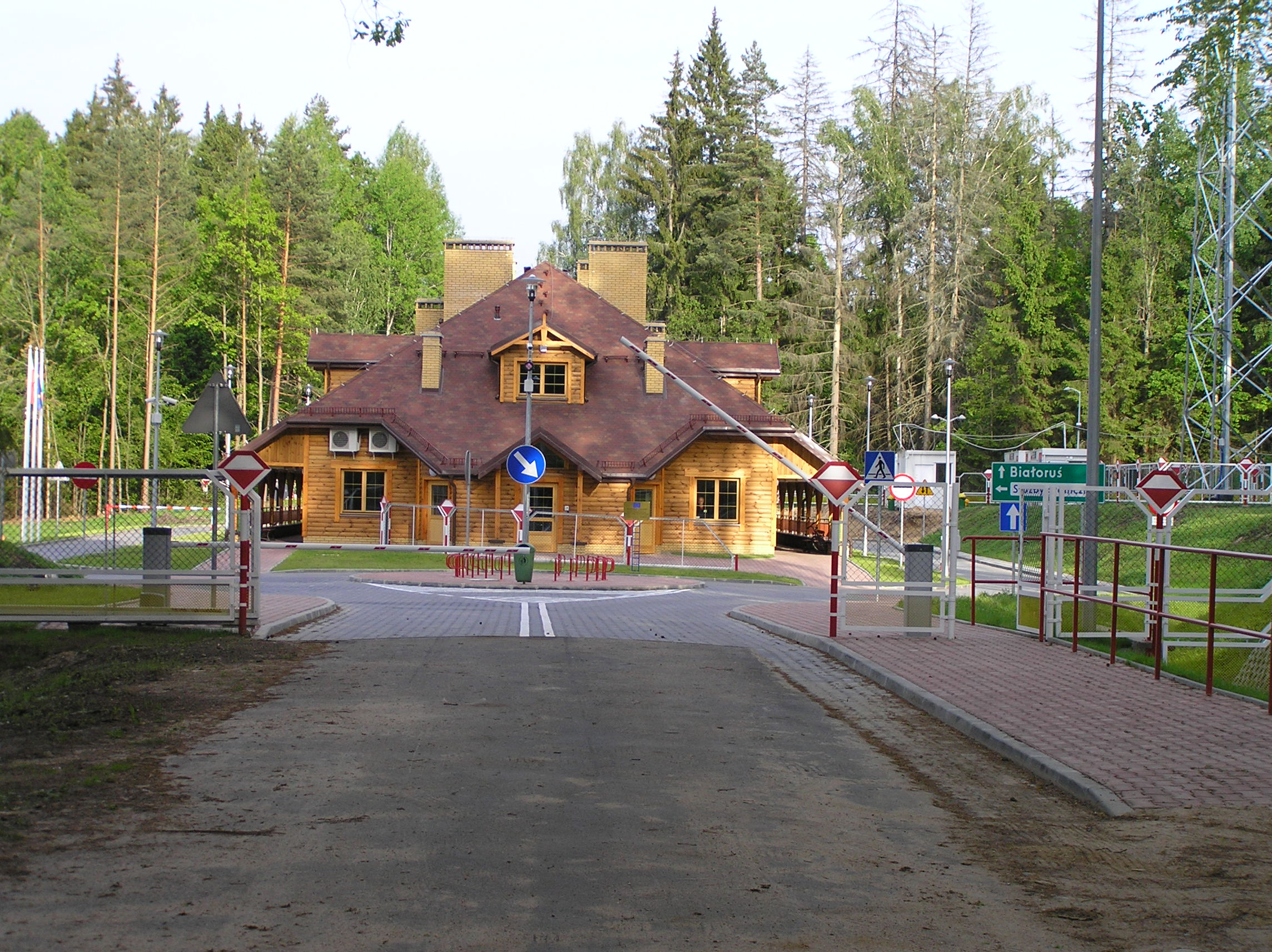 Przejście graniczne Polska-Białoruś w Białowieży